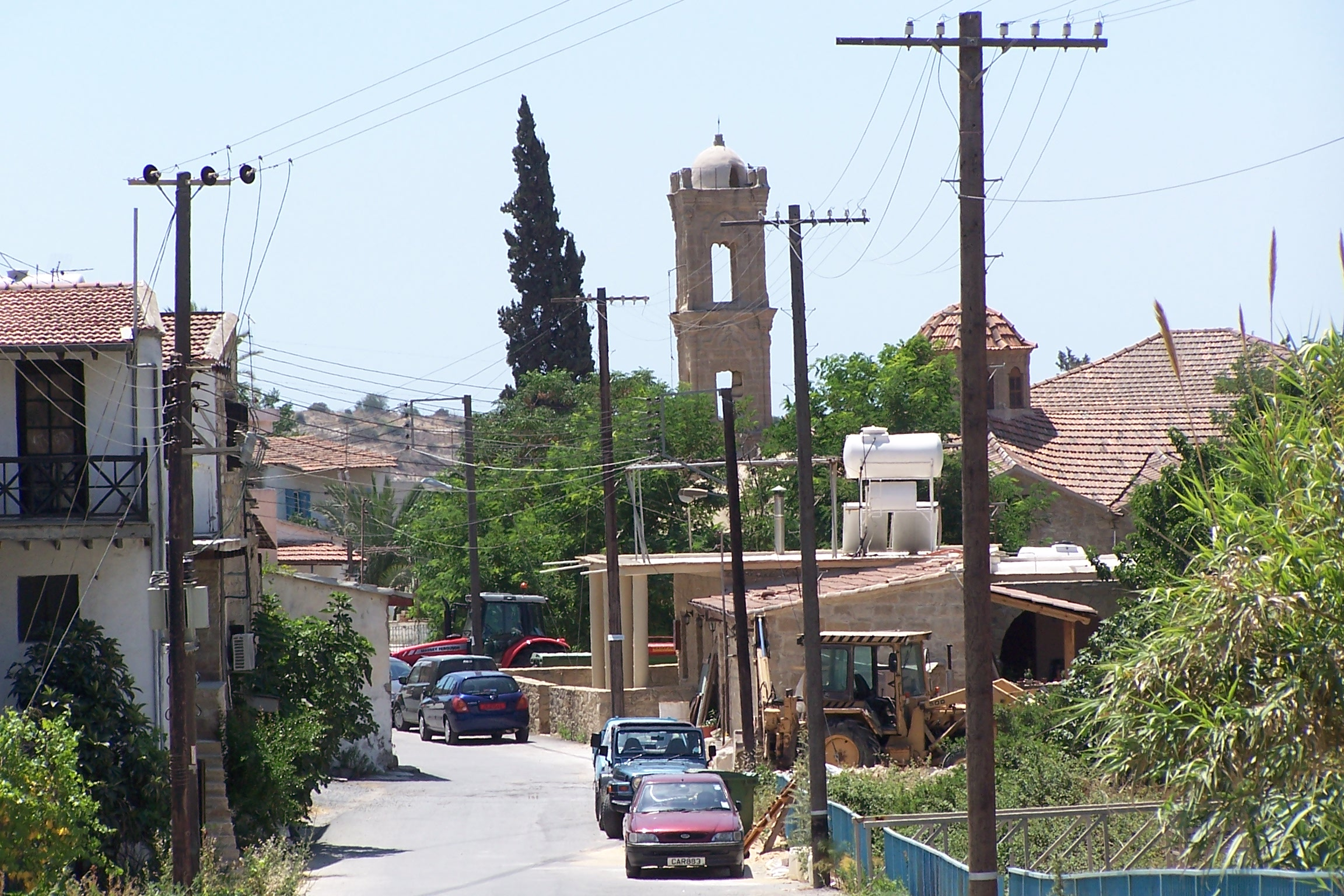 Tokhni.